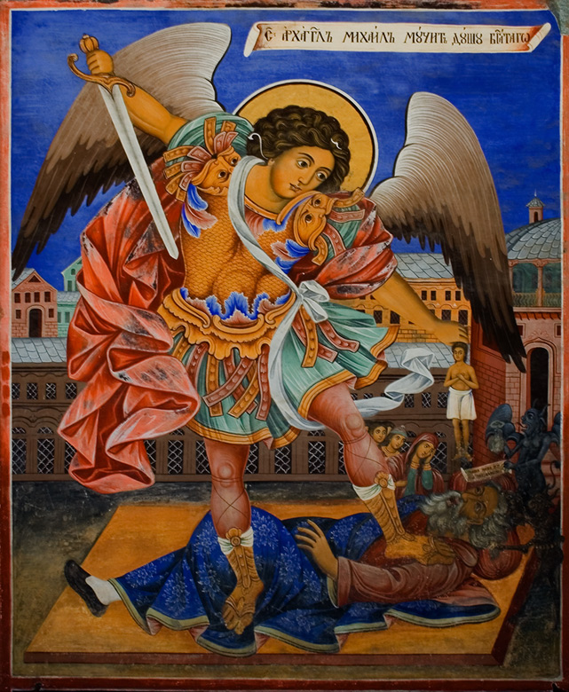 Икона на Св.Архангел Михаил в Рилски манастир